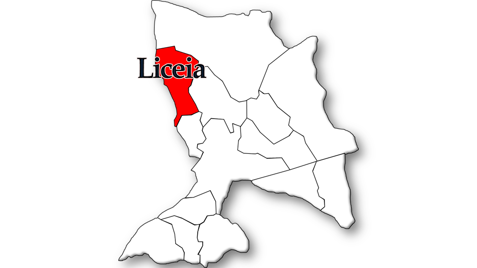 População